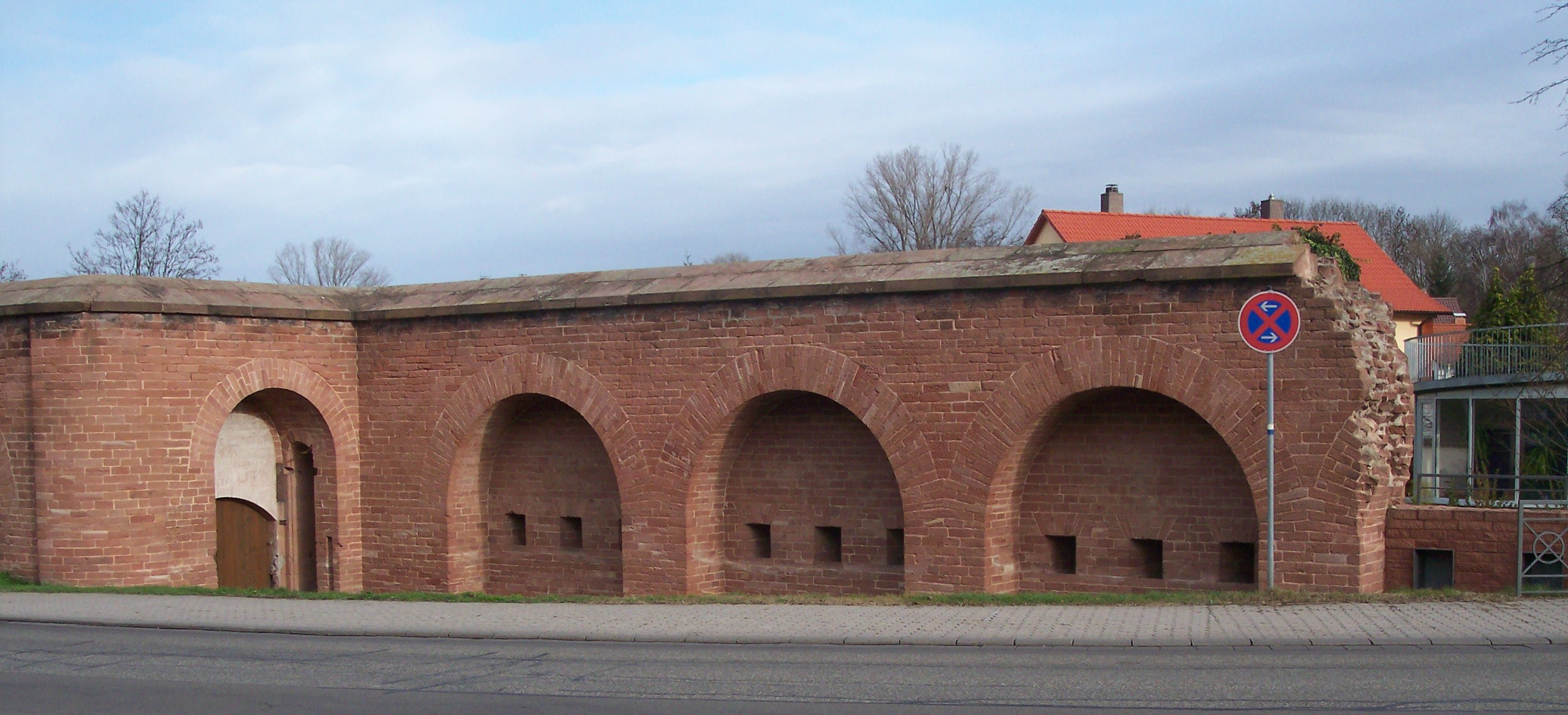 Ein Teil der „Carnot’schen Mauer“ heute. Original.